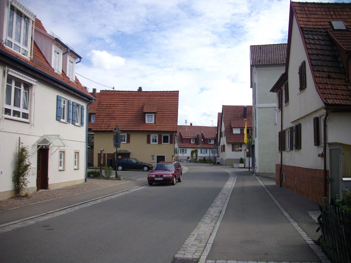 Eningen unter Achalm, Landkreis Reutlingen, Burgstraße